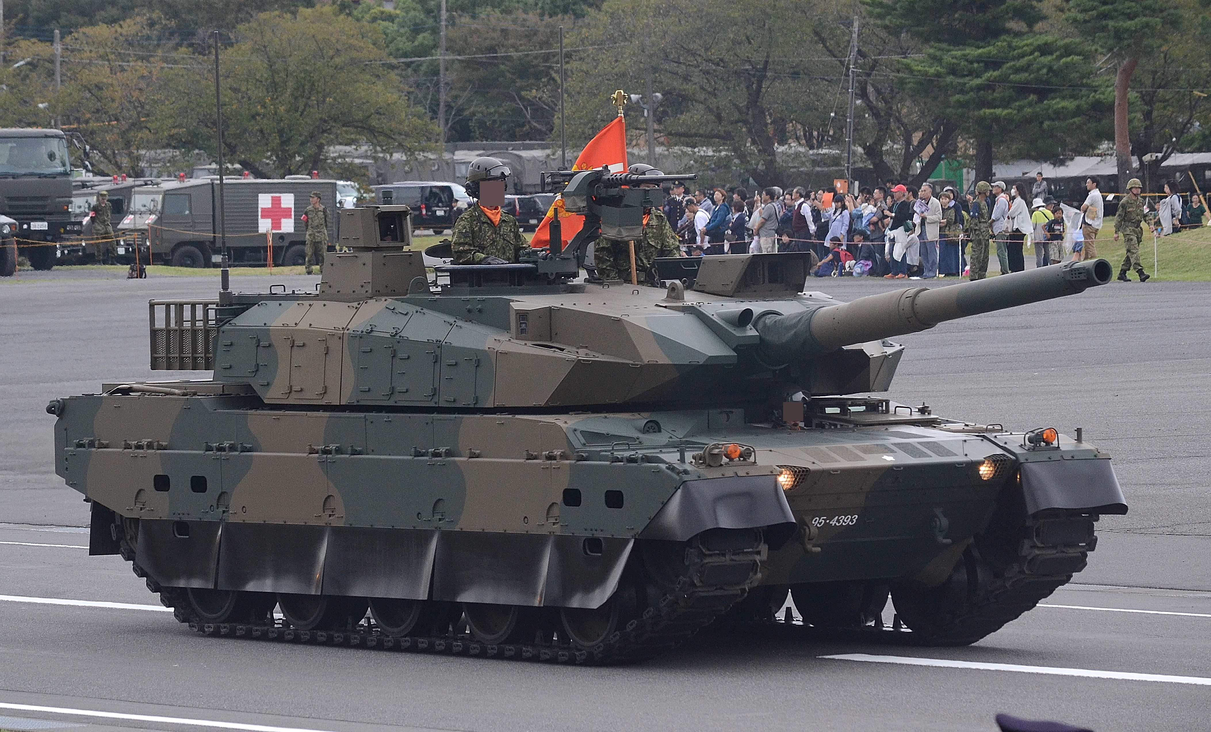 陸上自衛隊朝霞訓練場で行われた平成30年度自衛隊記念日観閲式総合予行での10式戦車。